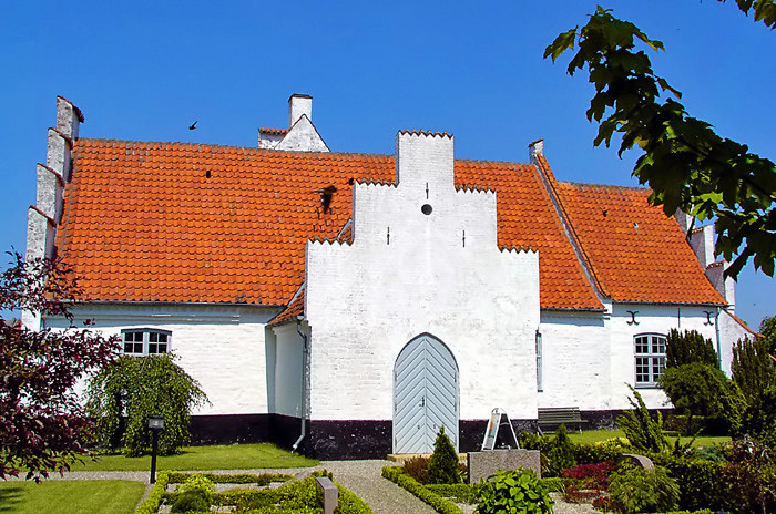 fra syd